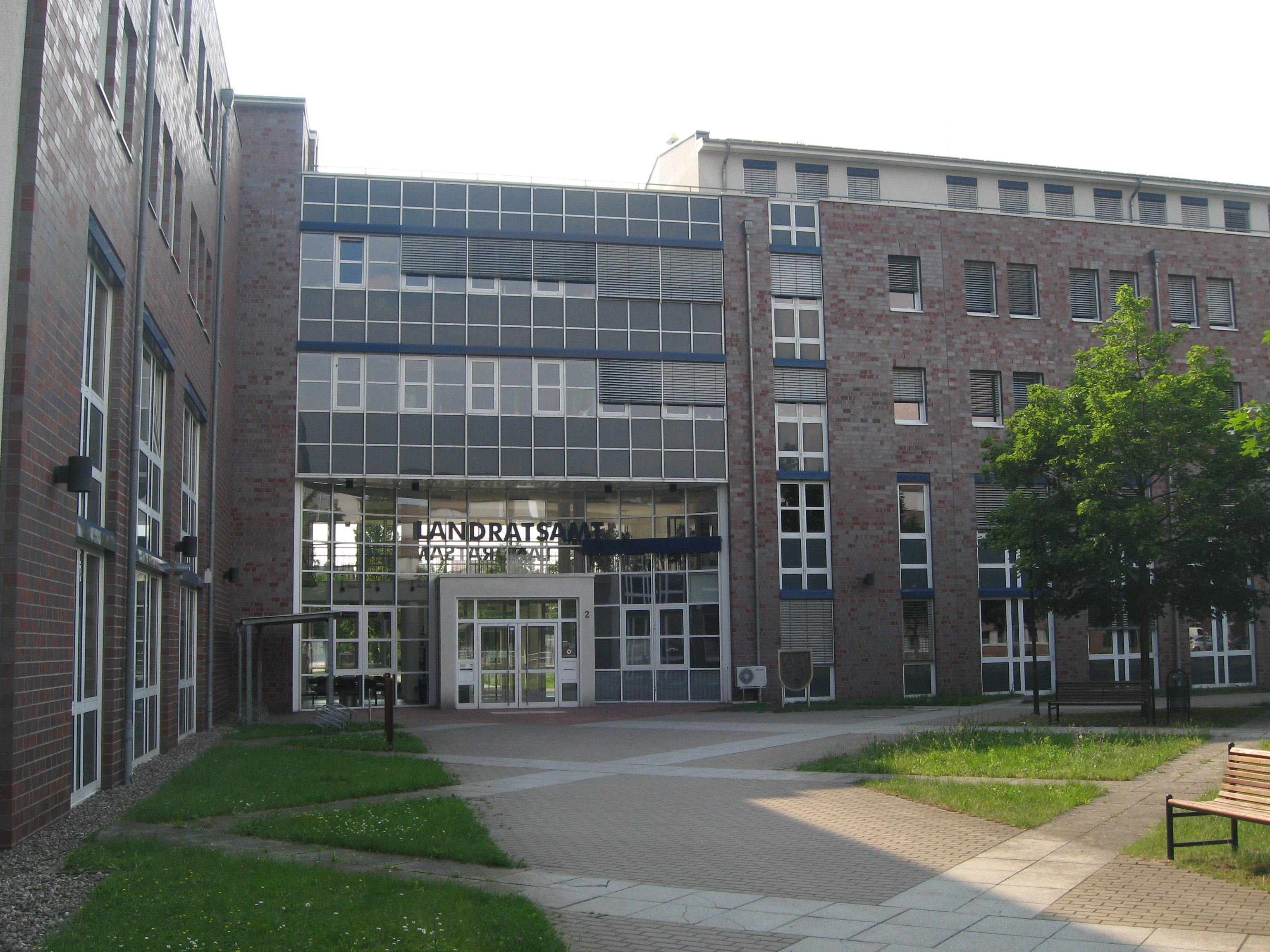 Landratsamt des damaligen Kreises Müritz in Mecklenburg-Vorpommern in Waren (Müritz)